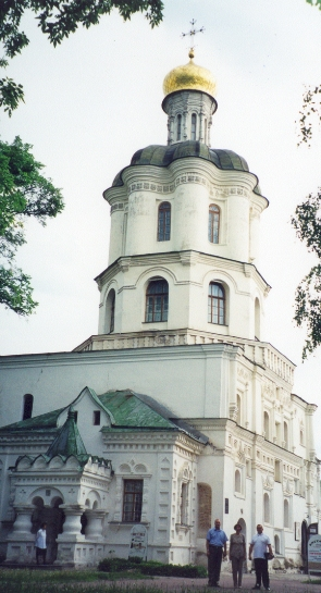 Черниговский коллегиум, построенный гетманом Мазепою, Чернигов, 2003 год